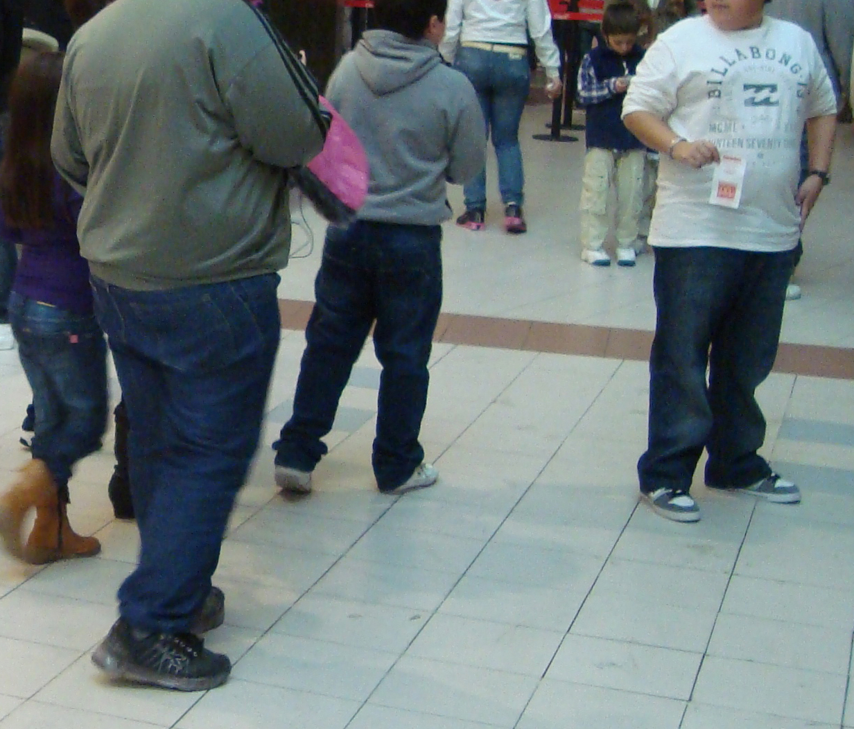 Un adolescente y un niño, ambos obesos.